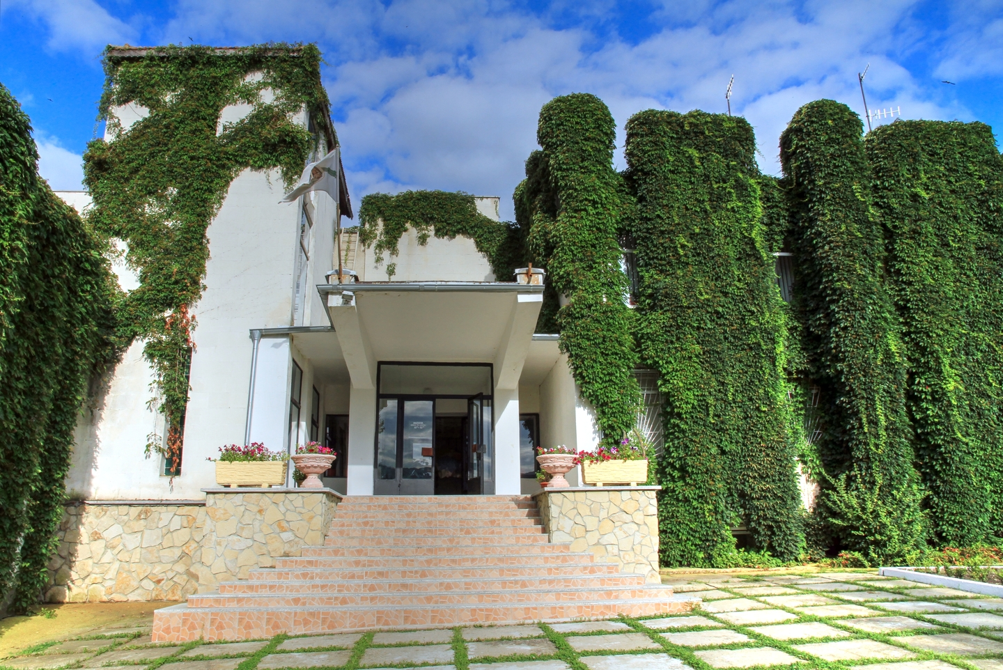 Кодру, монумент природы, находится в Стрэшенский район, с. Лозова (код MD-ST-rs-001)